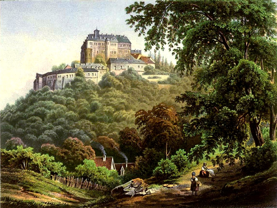 Schloss Wernigerode, Lithografie aus dem 19. Jahrhundert